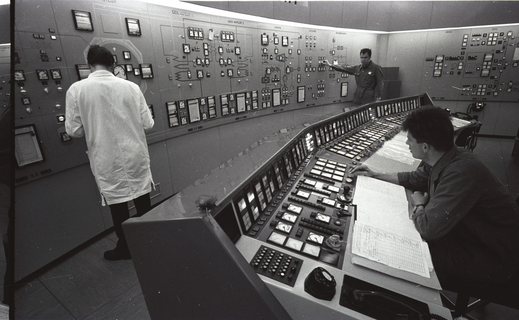 Lucens, Versuchsatomkraftwerk